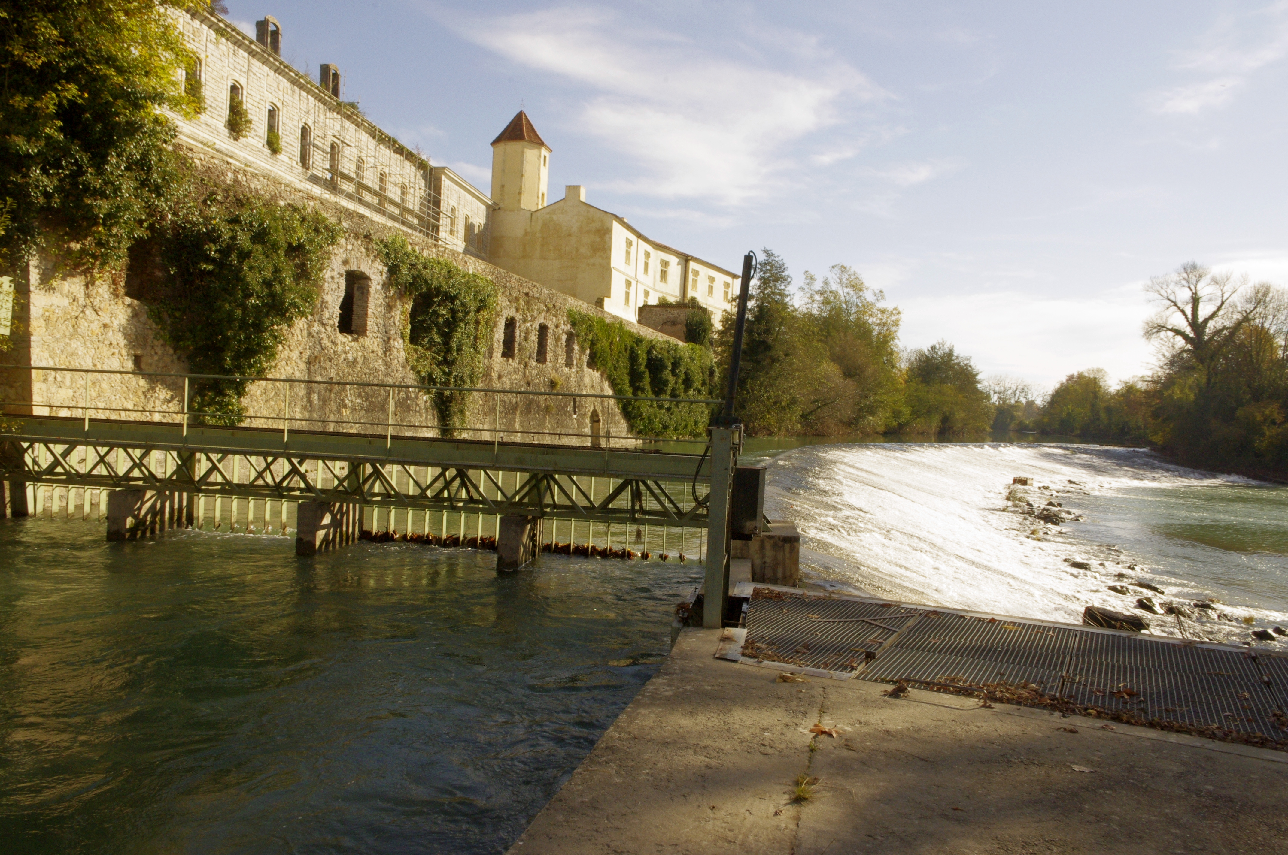 Sorde l'Abbaye - l'abbaye et la vanne protection depuis la centrale électrique sur le Gave d’Oloron